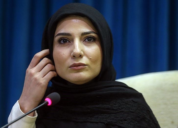 سمیرا حسن‌پور - ۱۳۹۷